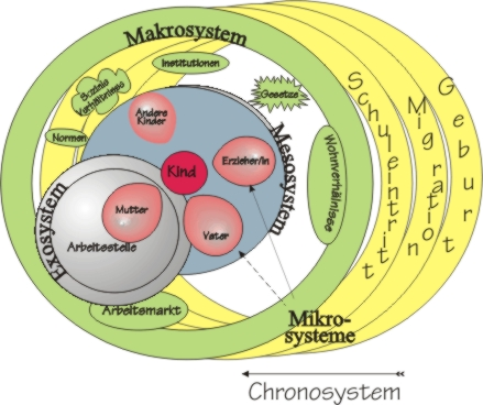 Die Systemebenen des Ökosystems bei Bronfenbrenner